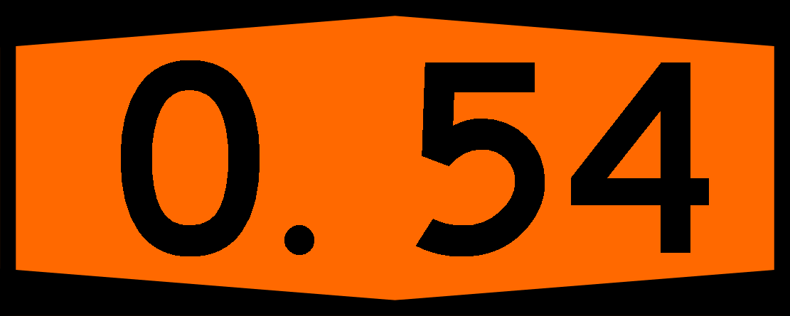 Otoyolu 54